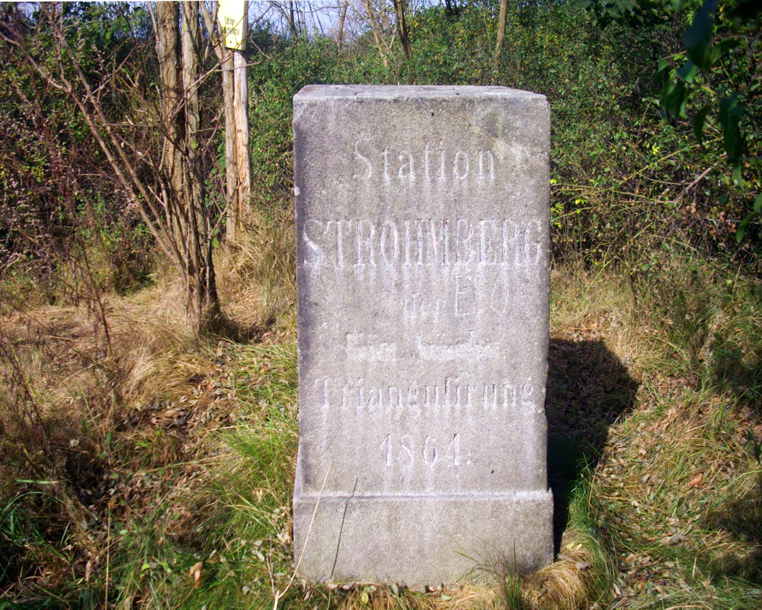 Königlich-Sächsische Triangulation Station 47 Strohmberg Vermessungspunkt II. Ordnung